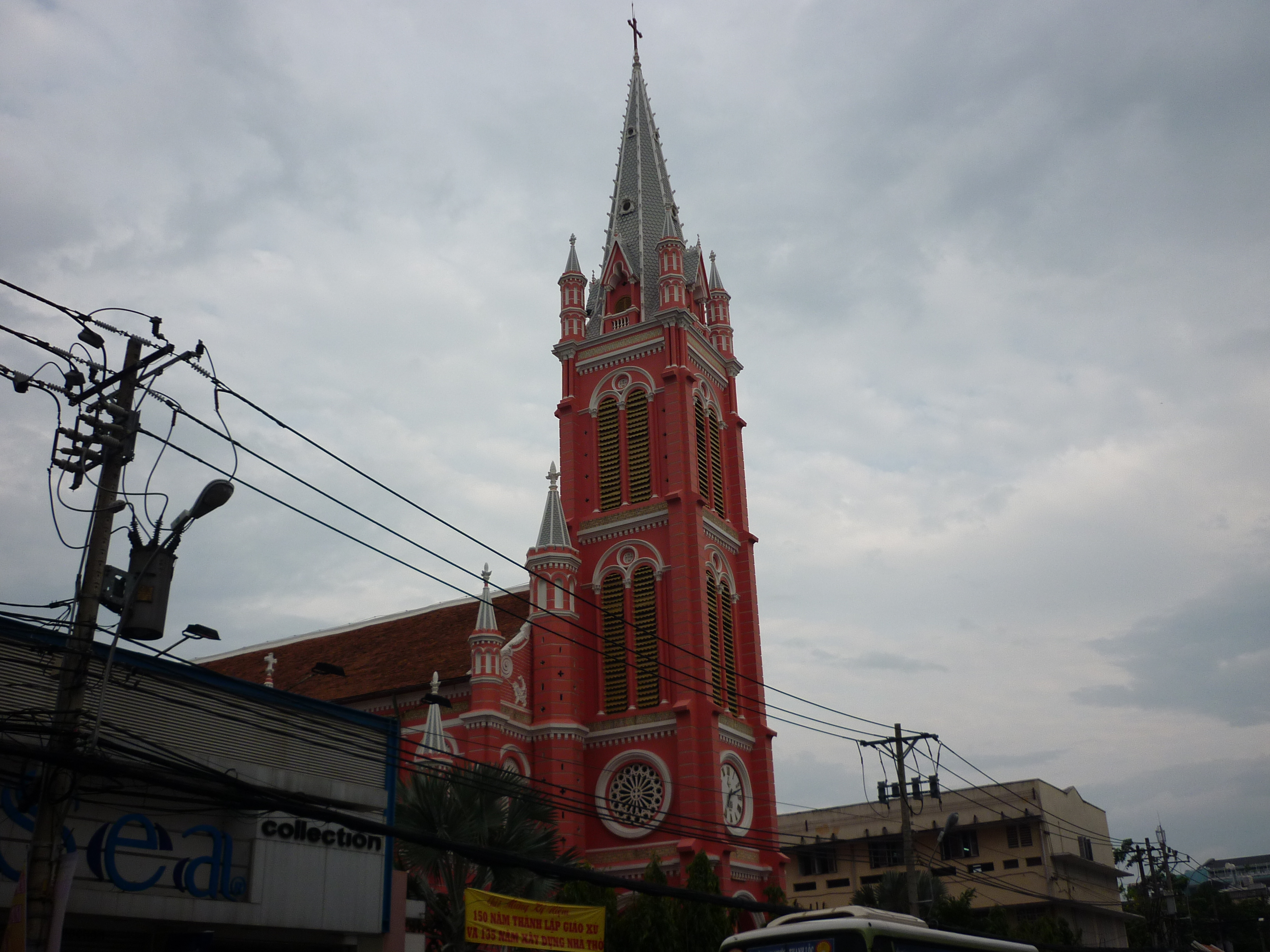 Nhà thờ Tân Định ở đường Hai Bà Trưng là một trong những nhà thờ xưa nhất Sài Gòn